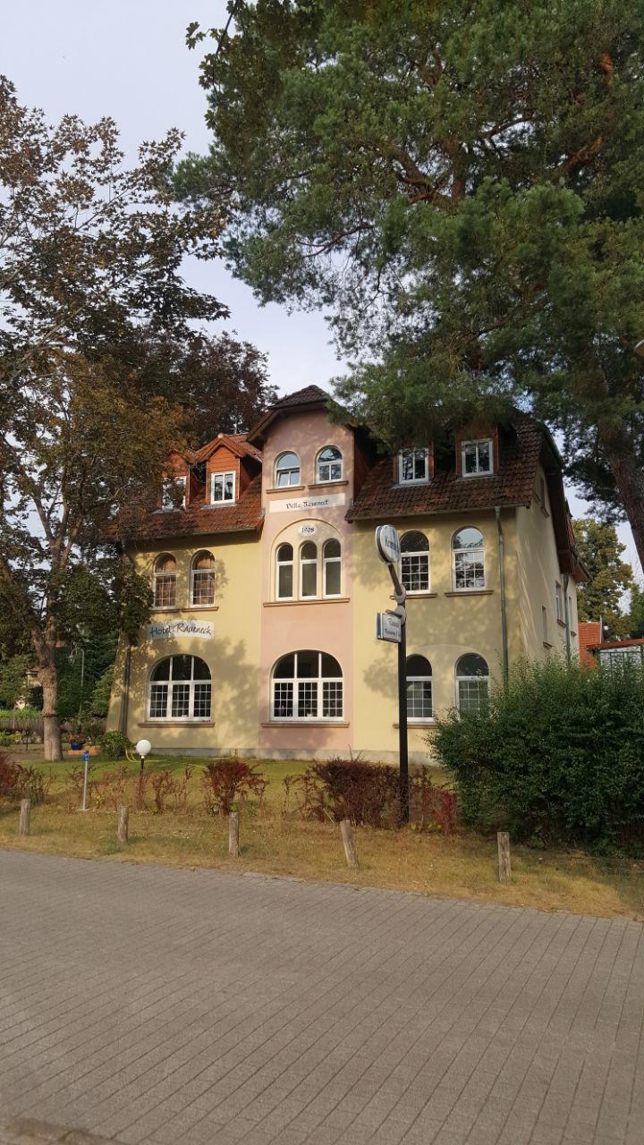 Diese Villa wird heute als Hotel genutzt